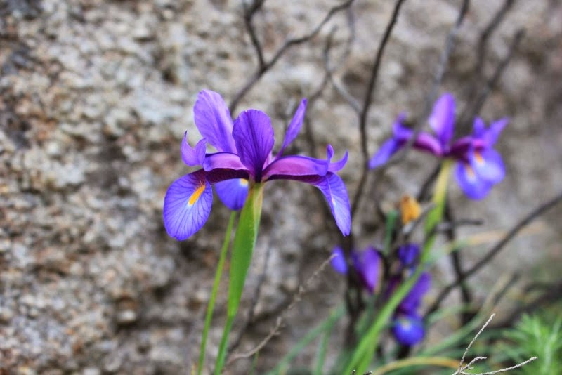 Lirio de monte, Iris boissieri, no monte Pindo.